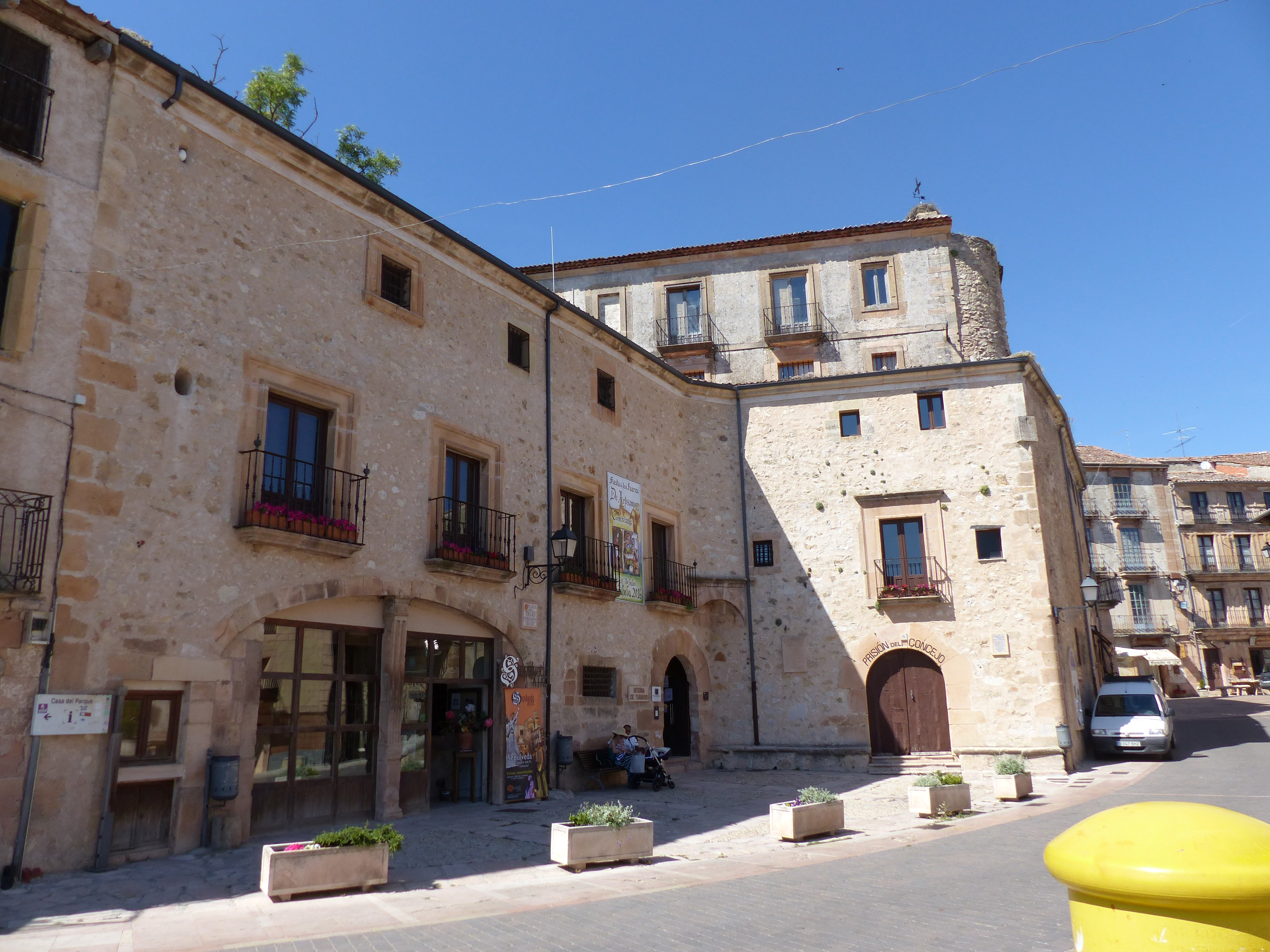 Vieja cárcel de Sepúlveda